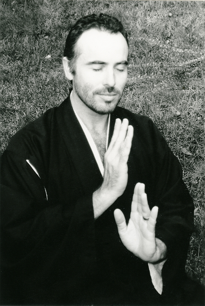 TRANSPARADOX: Transparadoxales-perceptions Pratique des éducatifs du Kata-Sarbacana (Zen-Dojo-Sarbacana, Michel-Laurent Dioptaz, Chanteloup 1985)